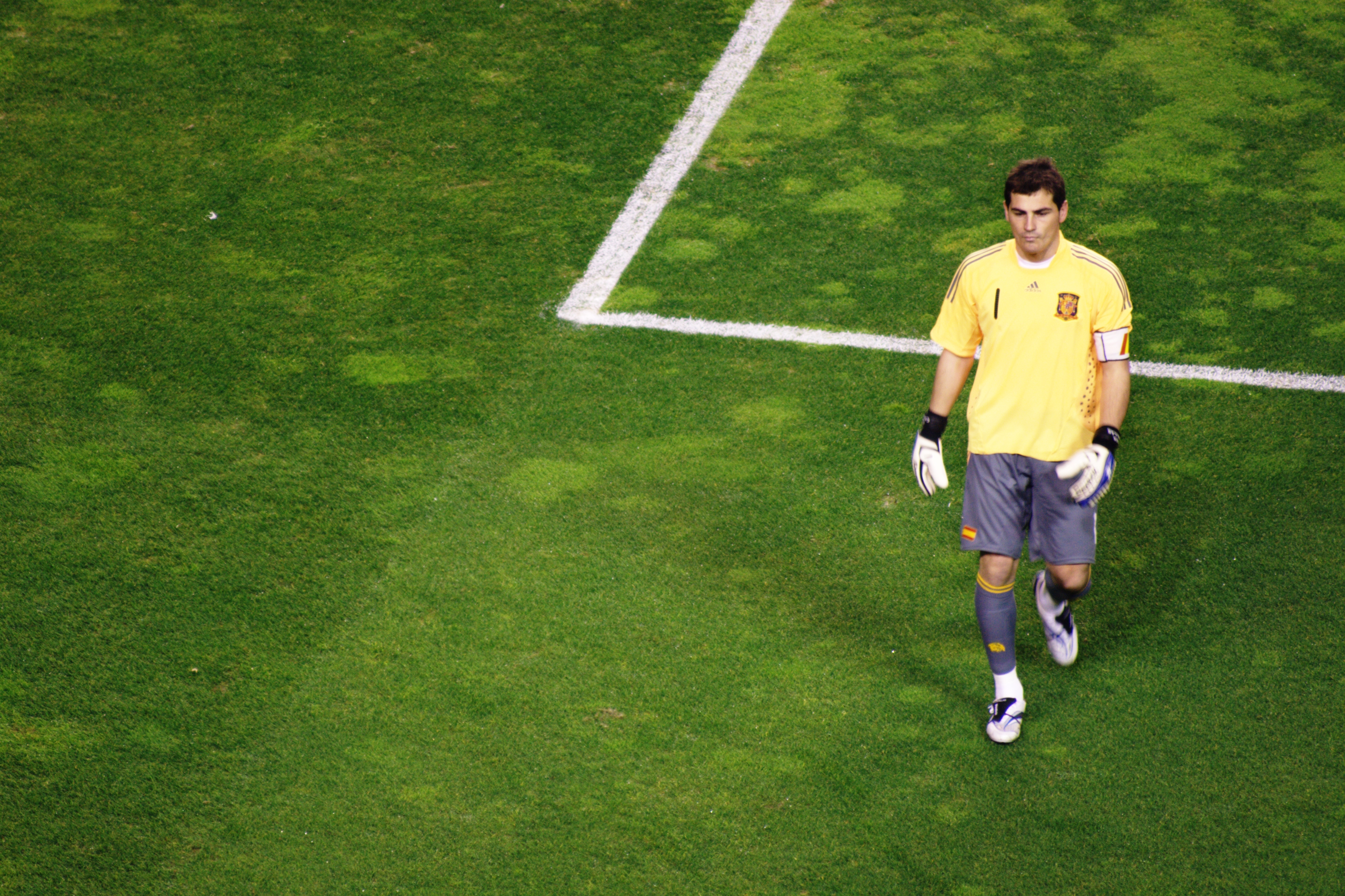 Iker Casillas en un partido amistoso contra la selección de Inglaterra.